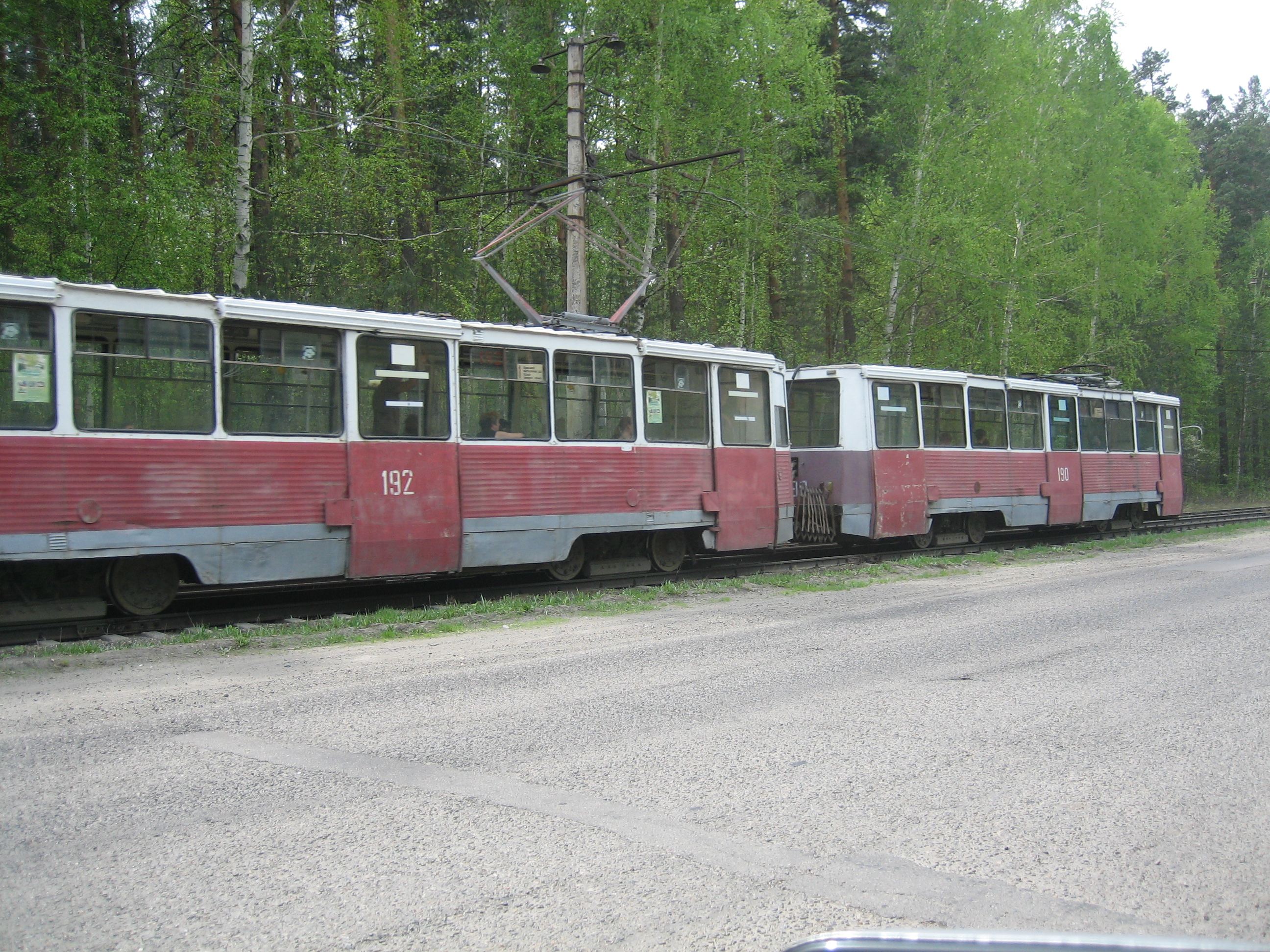 Трамвайный поезд между остановками Южная и Горная в Бийске